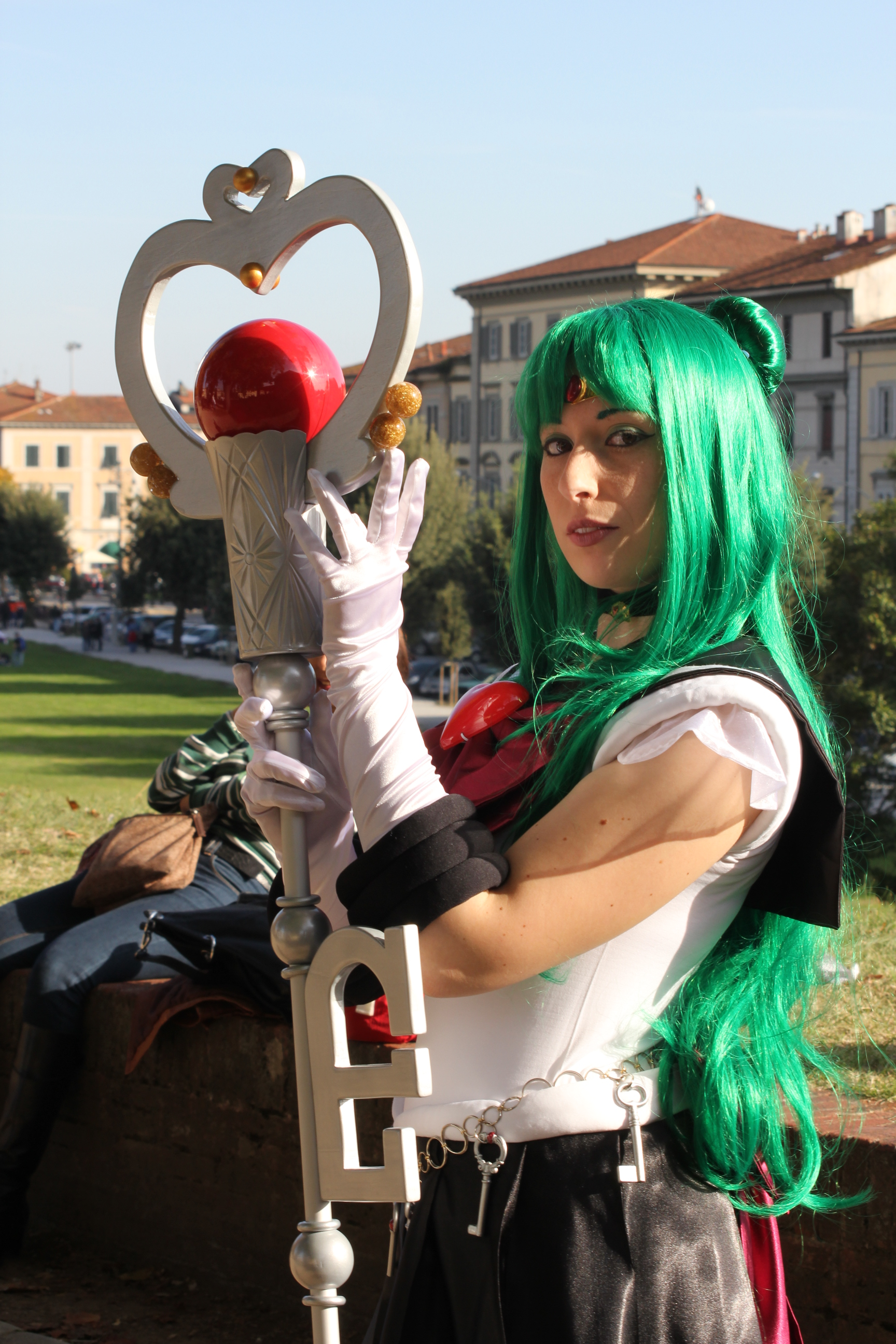 LuccaComics2011_1_057